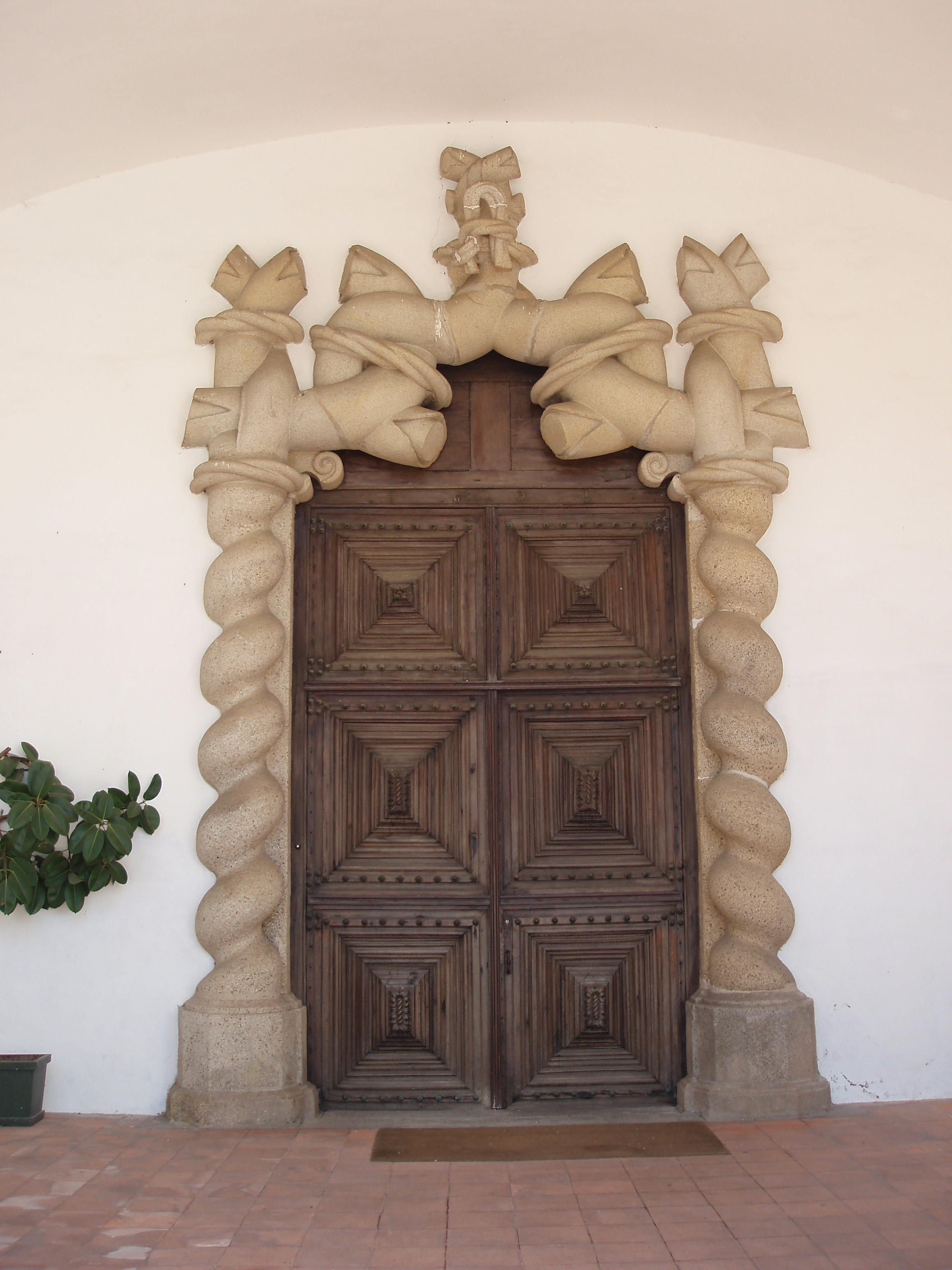 Porta dos Nós, Igreja do Carmo, Évora, Portugal (Séc.XVI)